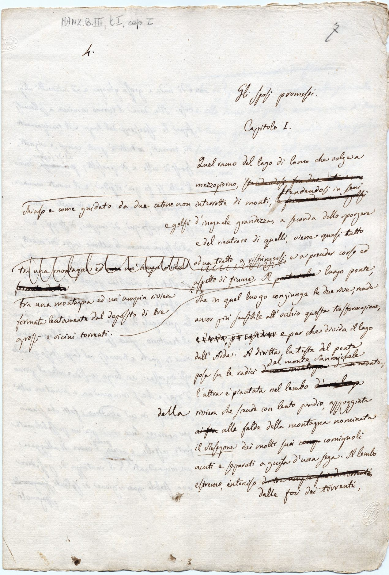 Alessandro Manzoni – prima pagina del manoscritto autografo de “I Promessi sposi”, 1821